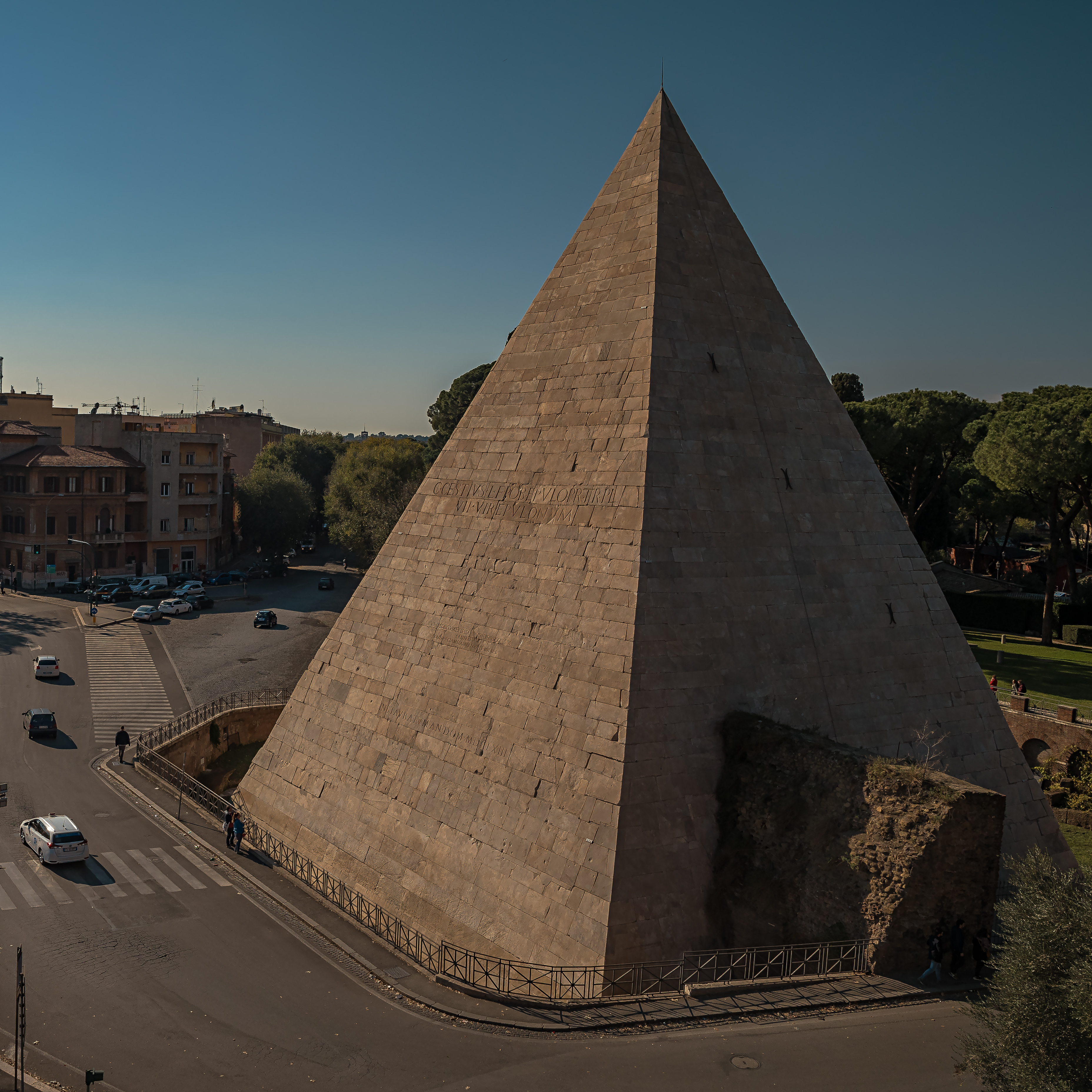 Die Cestius-Pyramide heute, aus Sicht von der Porta San Paolo